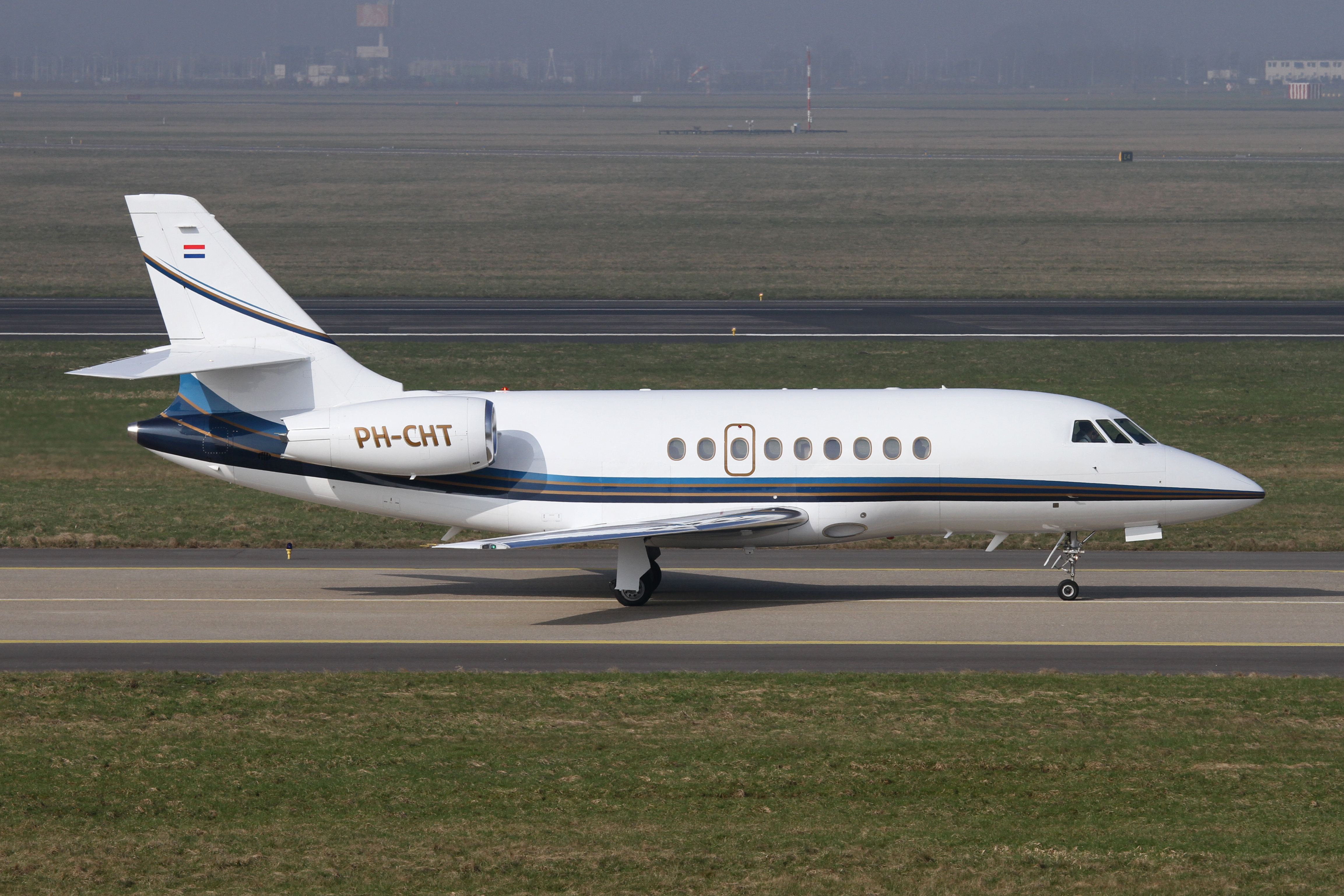 Dassault Falcon 2000ex